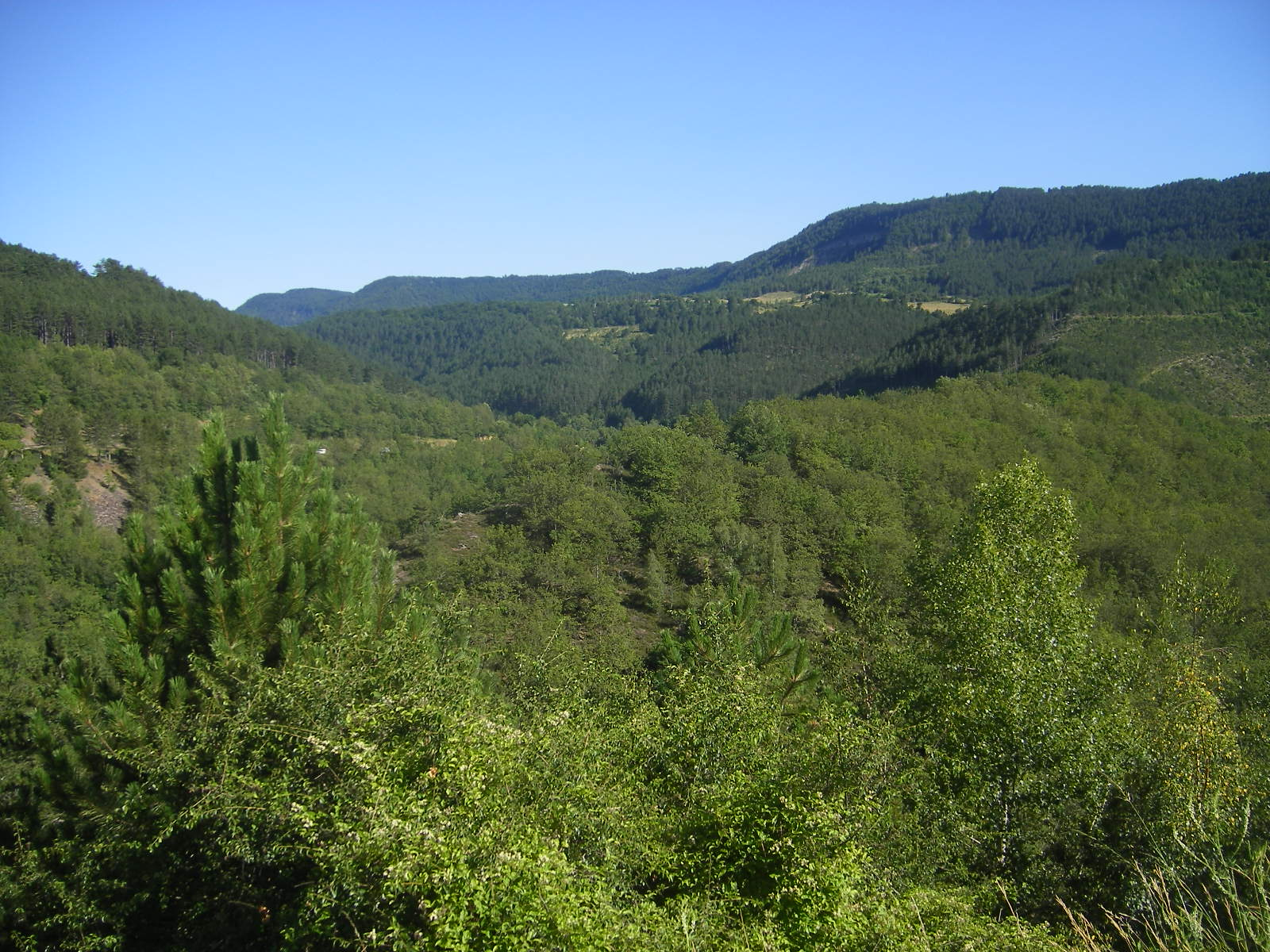 Col de la Tourette